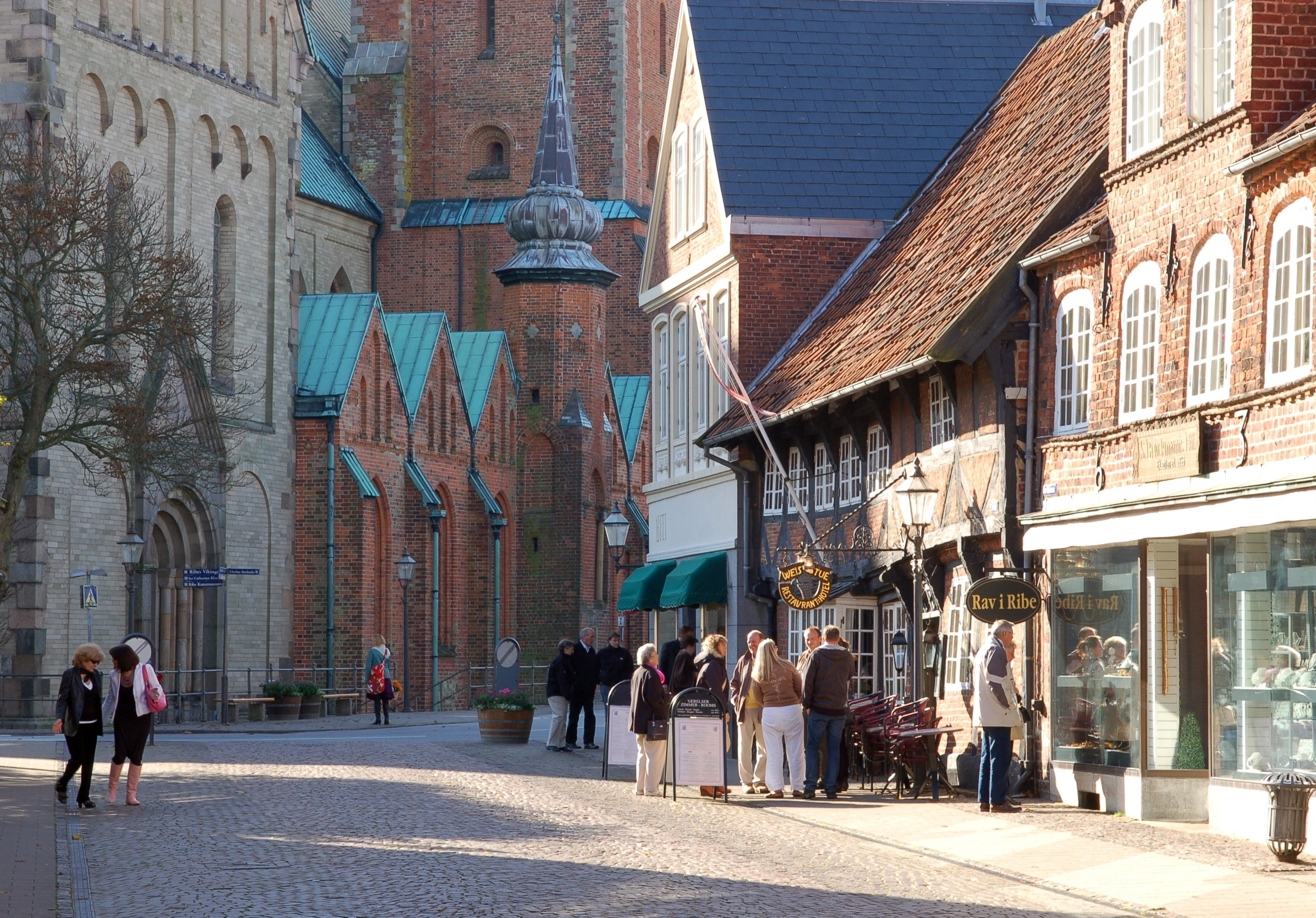 Ribe, DenmarkDansk: Overdammen i retning af domkirken